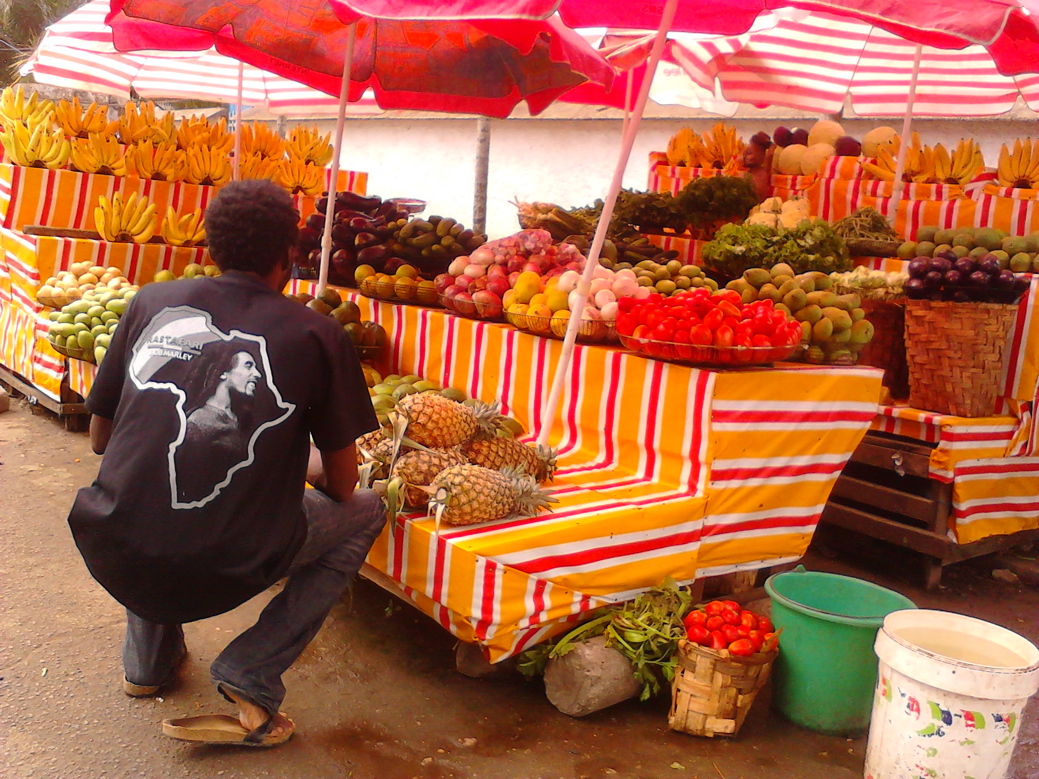 les merveilleux fruits du jardin de jah